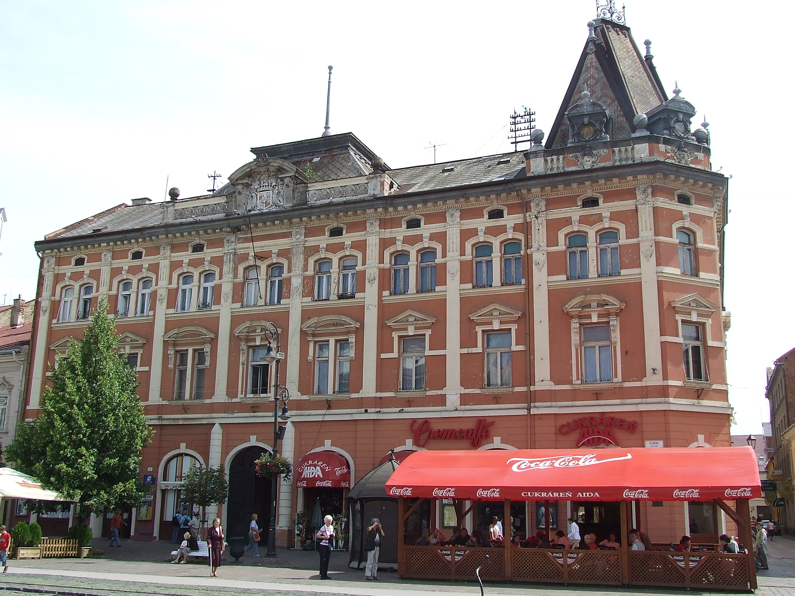 Andrássyho palác na Hlavnej ulici v Košiciach